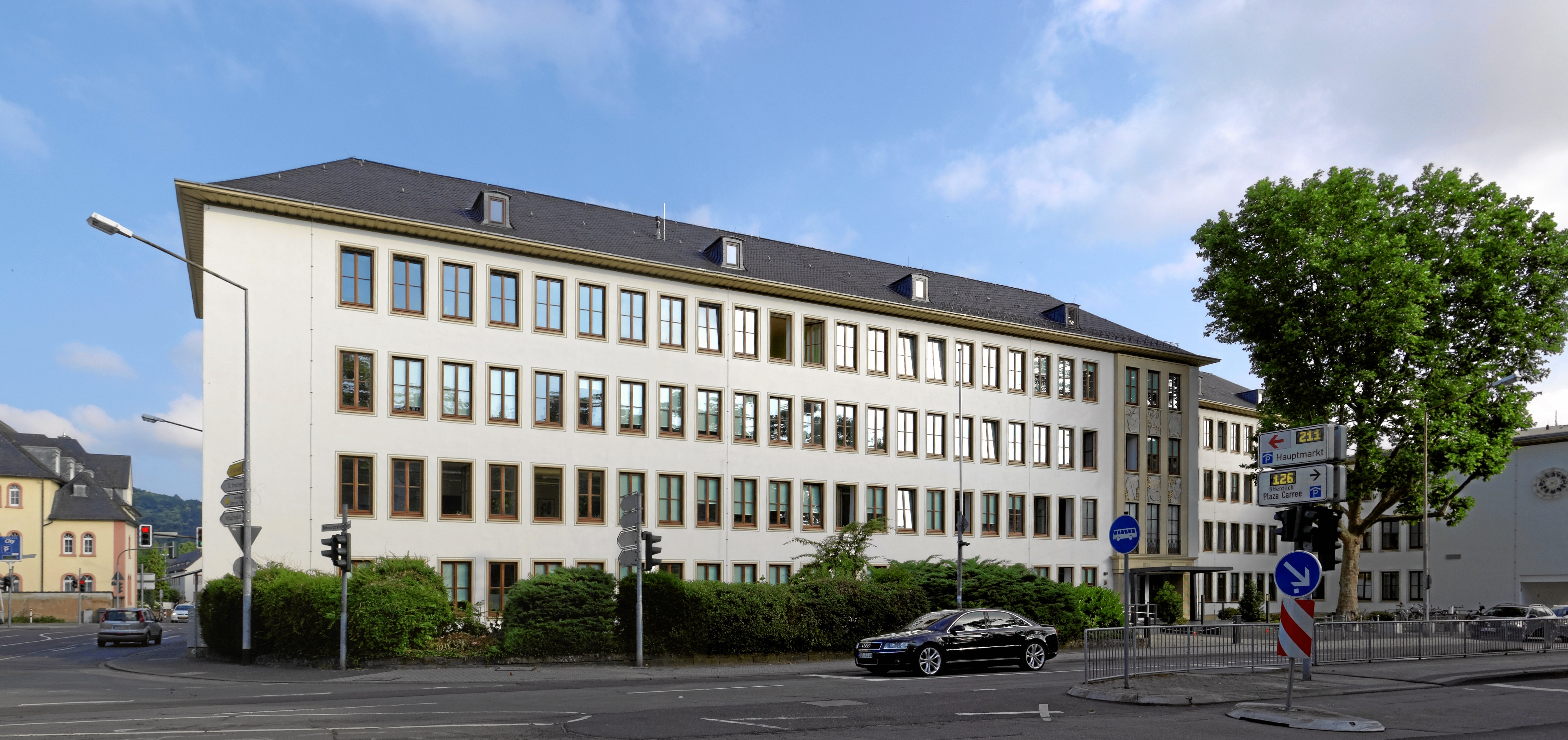 Trier, Amts- und Landgericht, Justizstraße